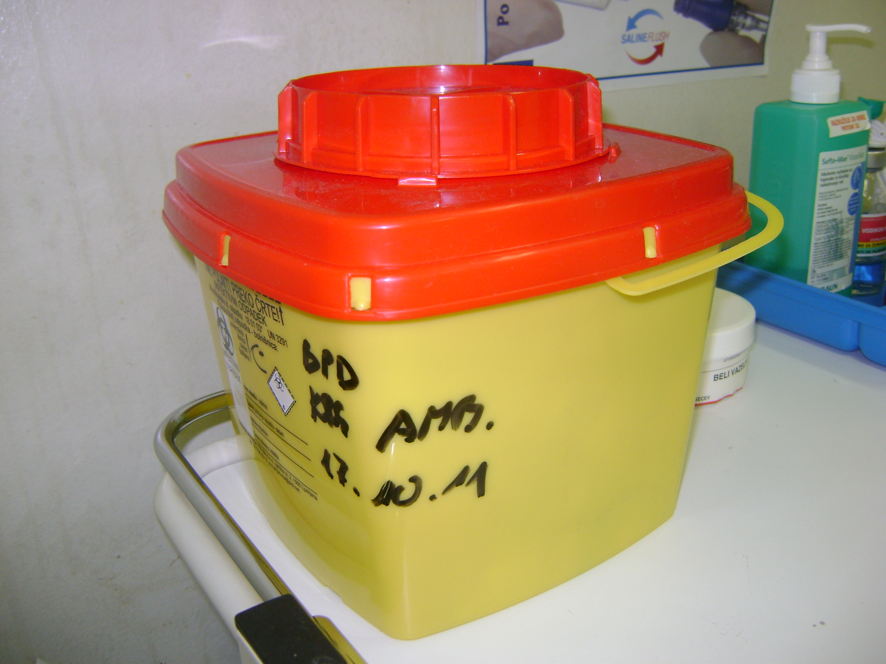 Sharp kontejner